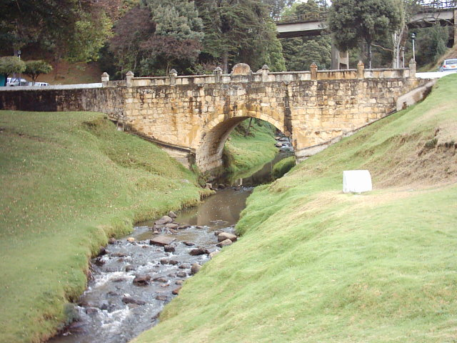 Puente del Río Boyacá (también conocido como Río Teatinos) en Colombia (En el lugar en donde se luchó la Batalla del Puente de Boyacá el 7 de agosto de 1819)